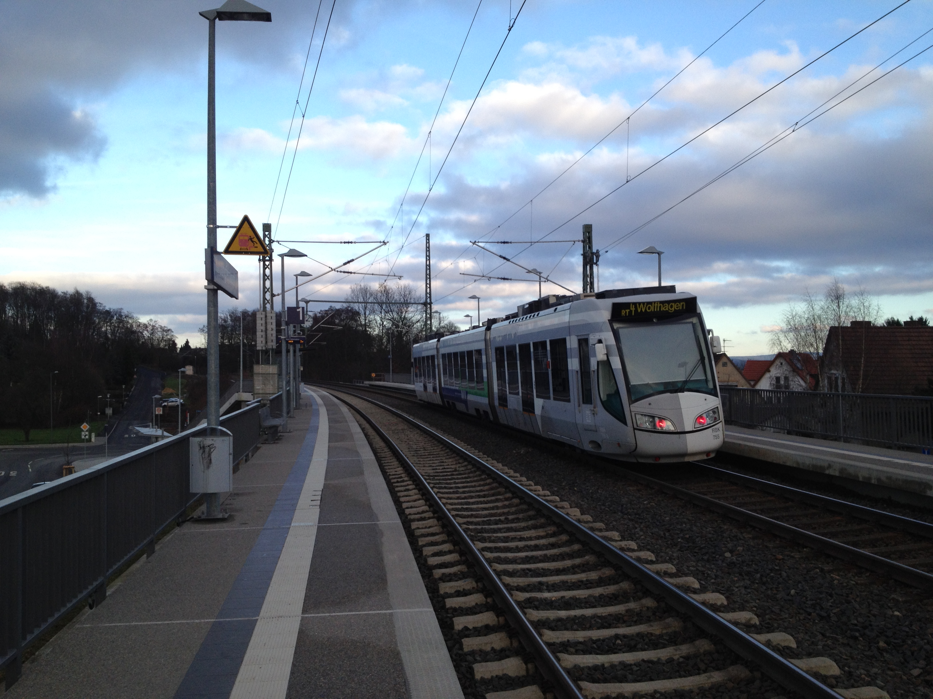 Der Bahnhof Kassel-Jungfernkopf, RT 4 nach Wolfhagen